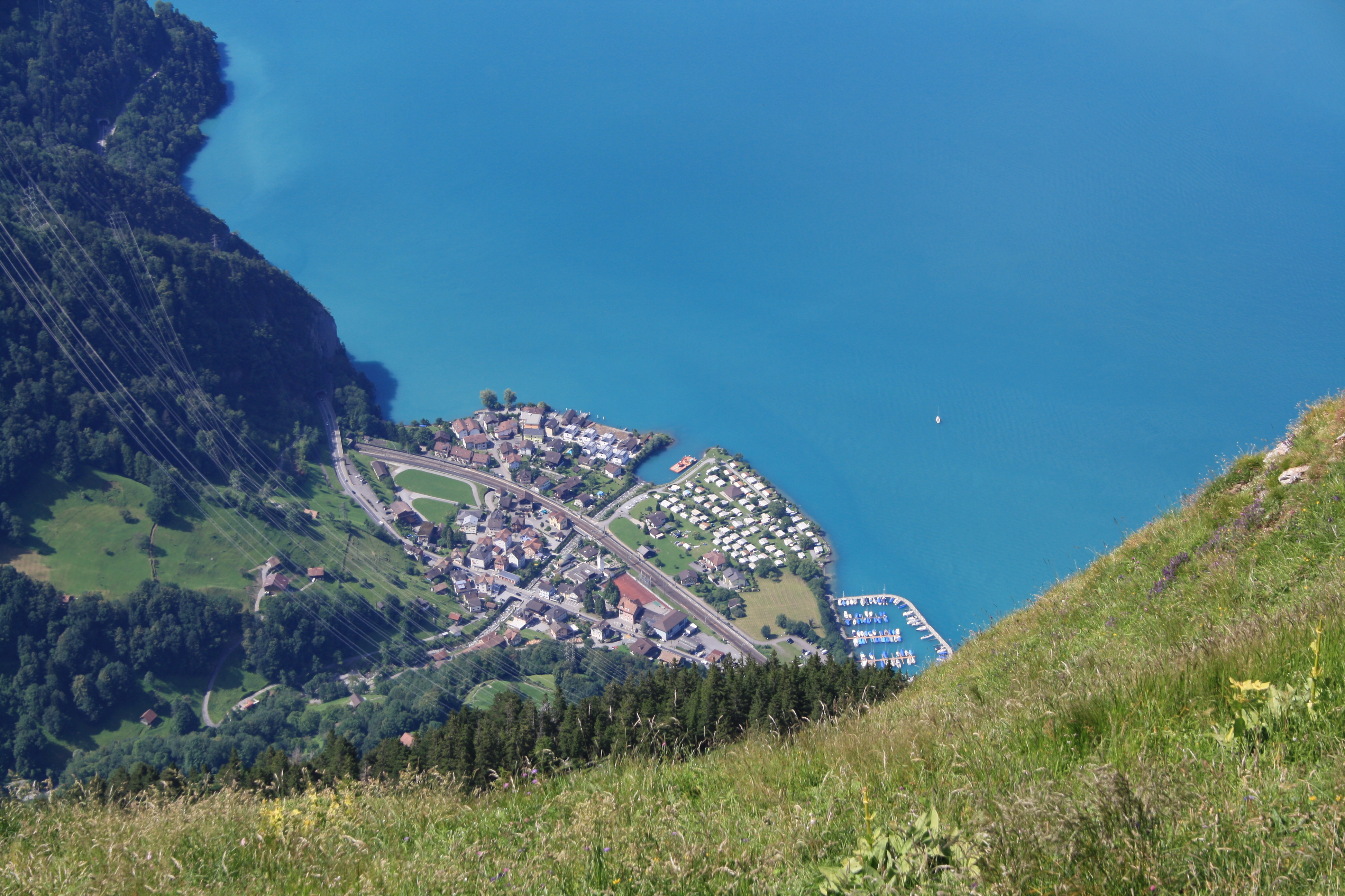 Blick vom Fronalpstock auf Sisikon